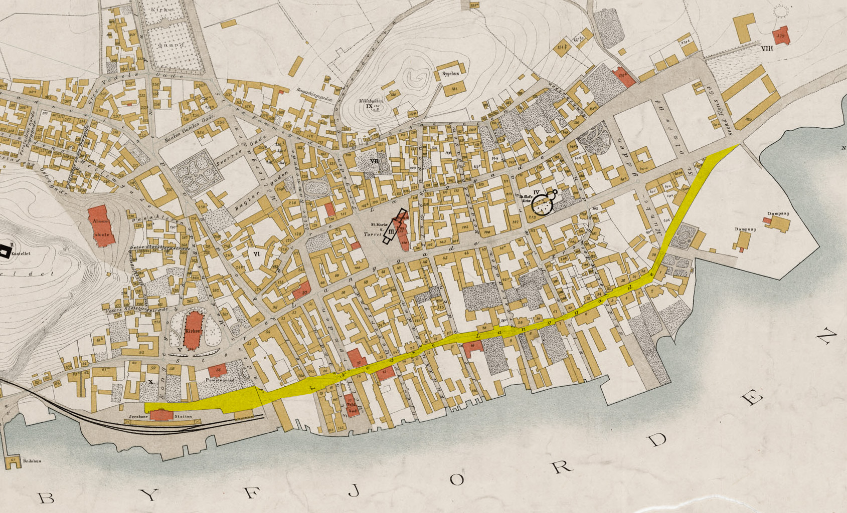 Tønsberg: Nedre Langgate markert gul på et kart fra 1883. Utsnitt av original.